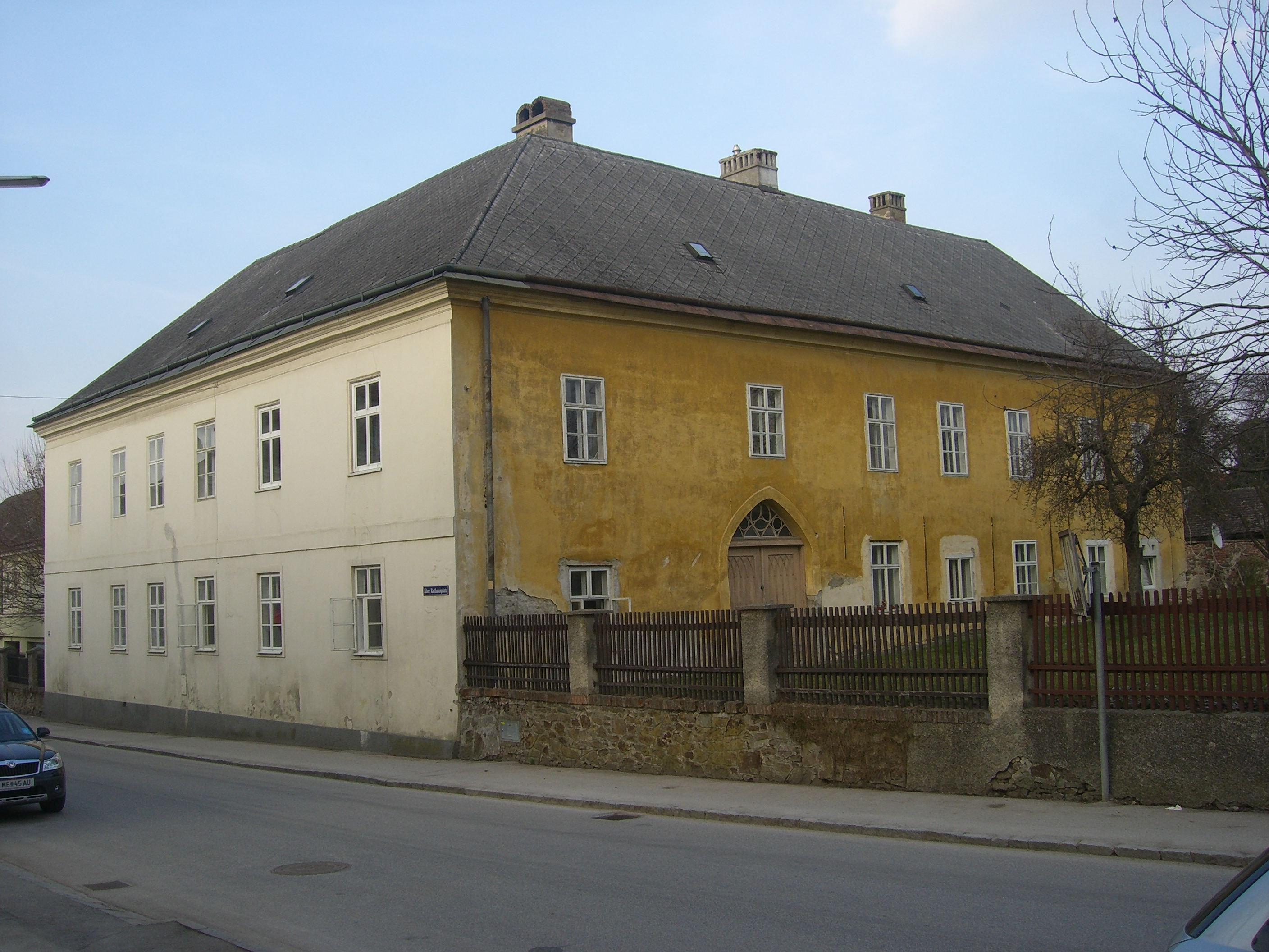 Hohe Schule, Alter Rathausplatz, Loosdorf